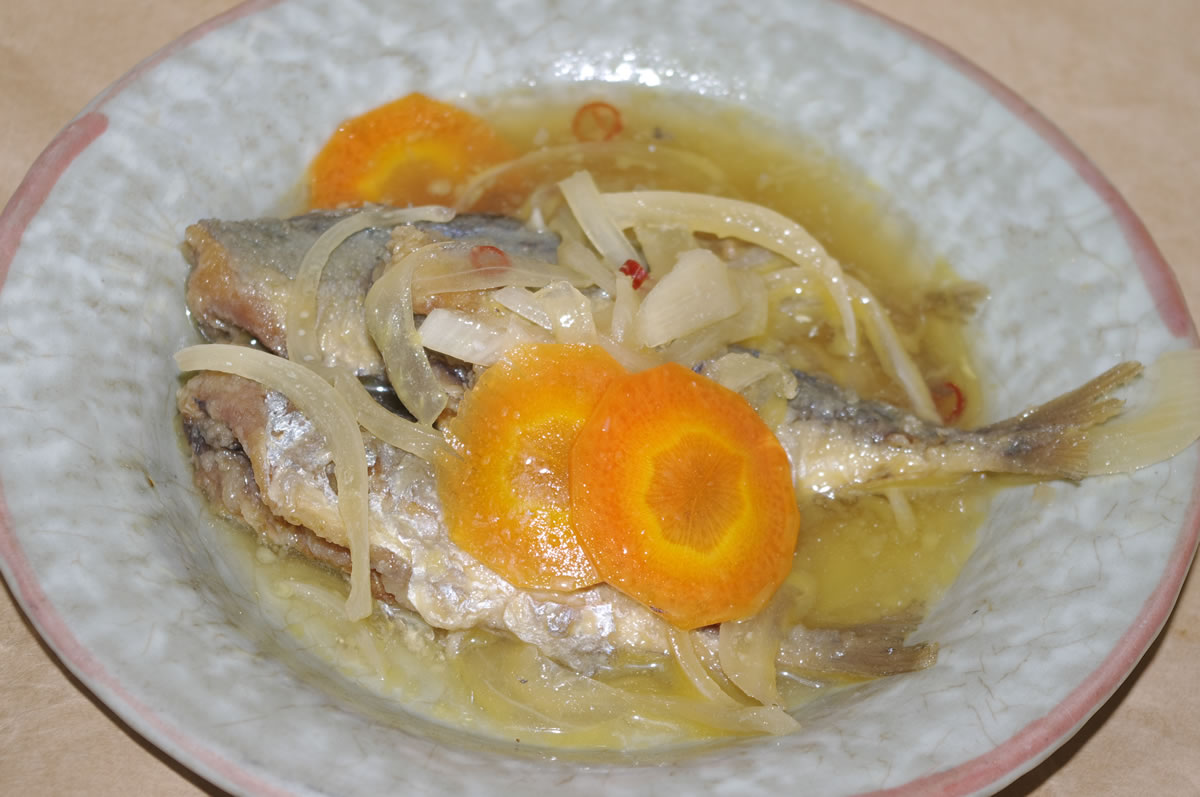 魚の鯵を使った南蛮漬け